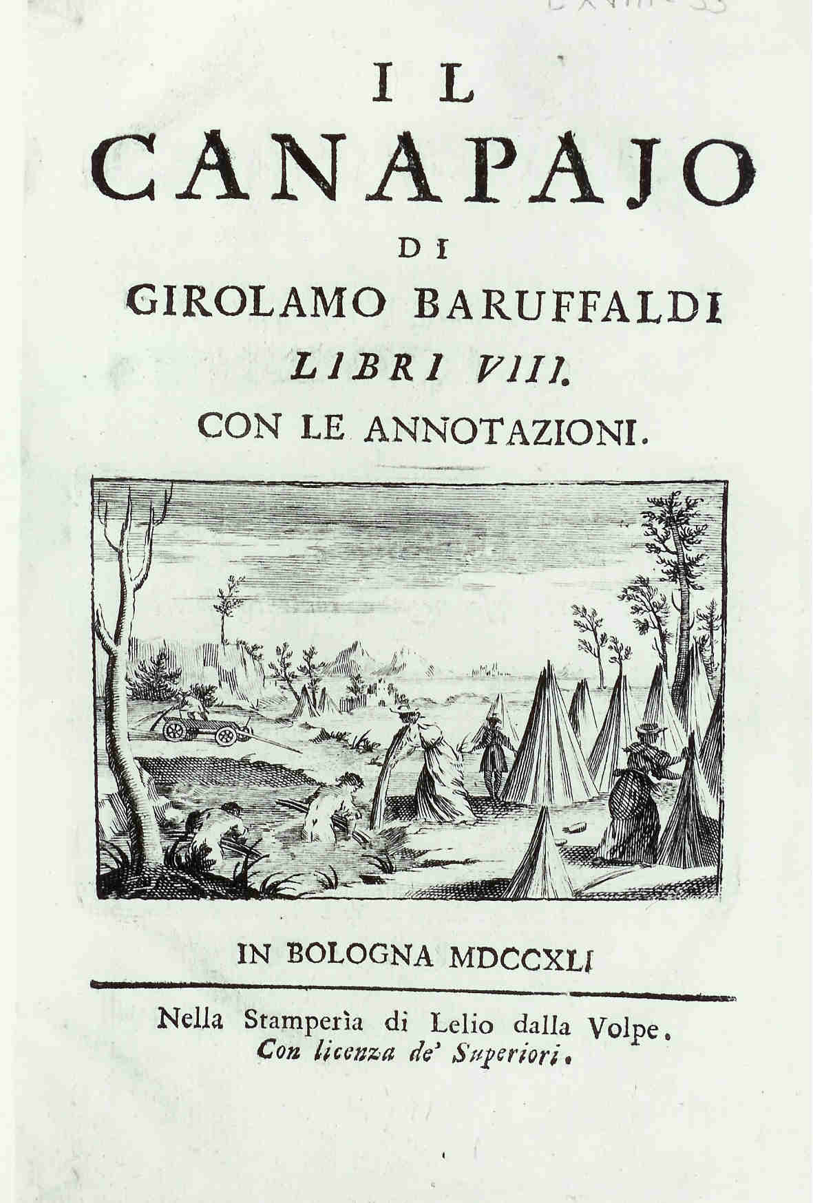 Frontespizio dell'opera Il Canapaio